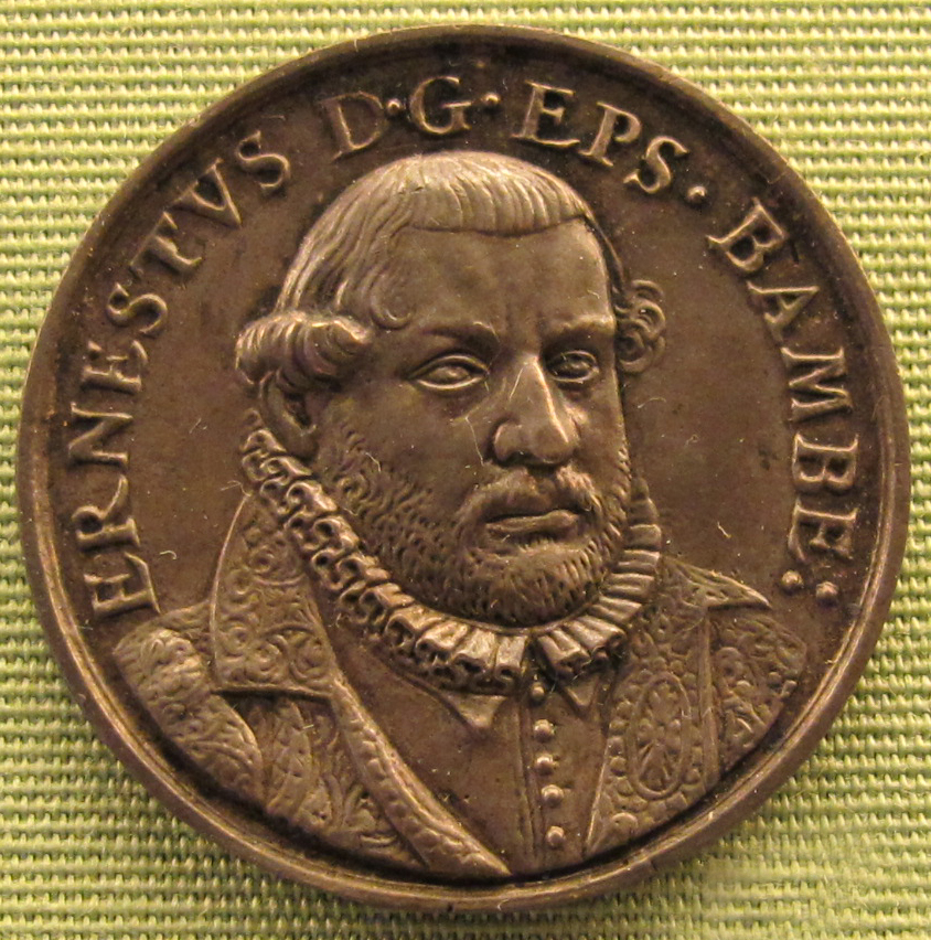 Ernst von Mengensdorf, vescovo di bamberga